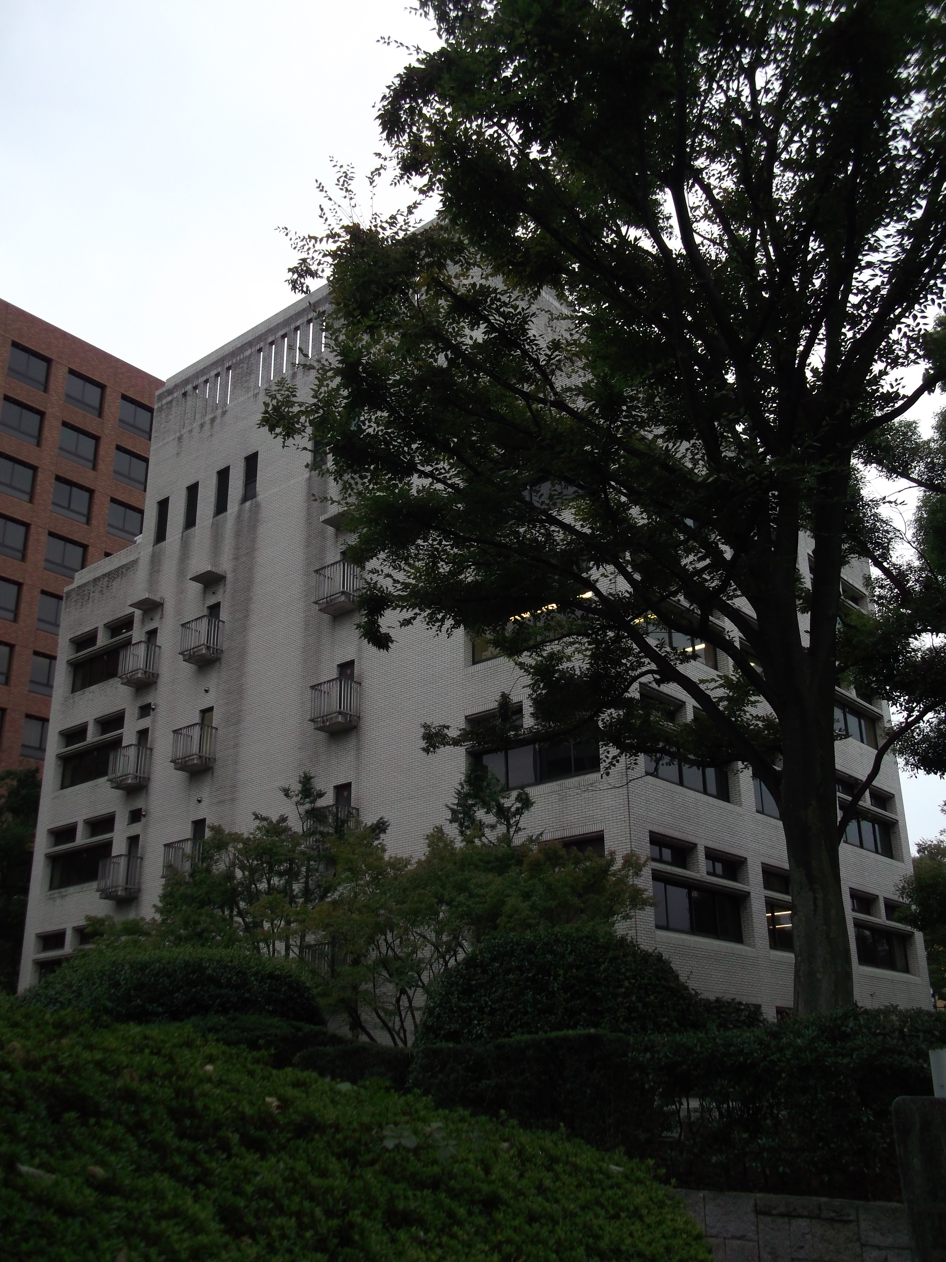 名古屋市中区の中部弁護士会連合会が入居する愛知県弁護士会館を北側公道東側から撮影